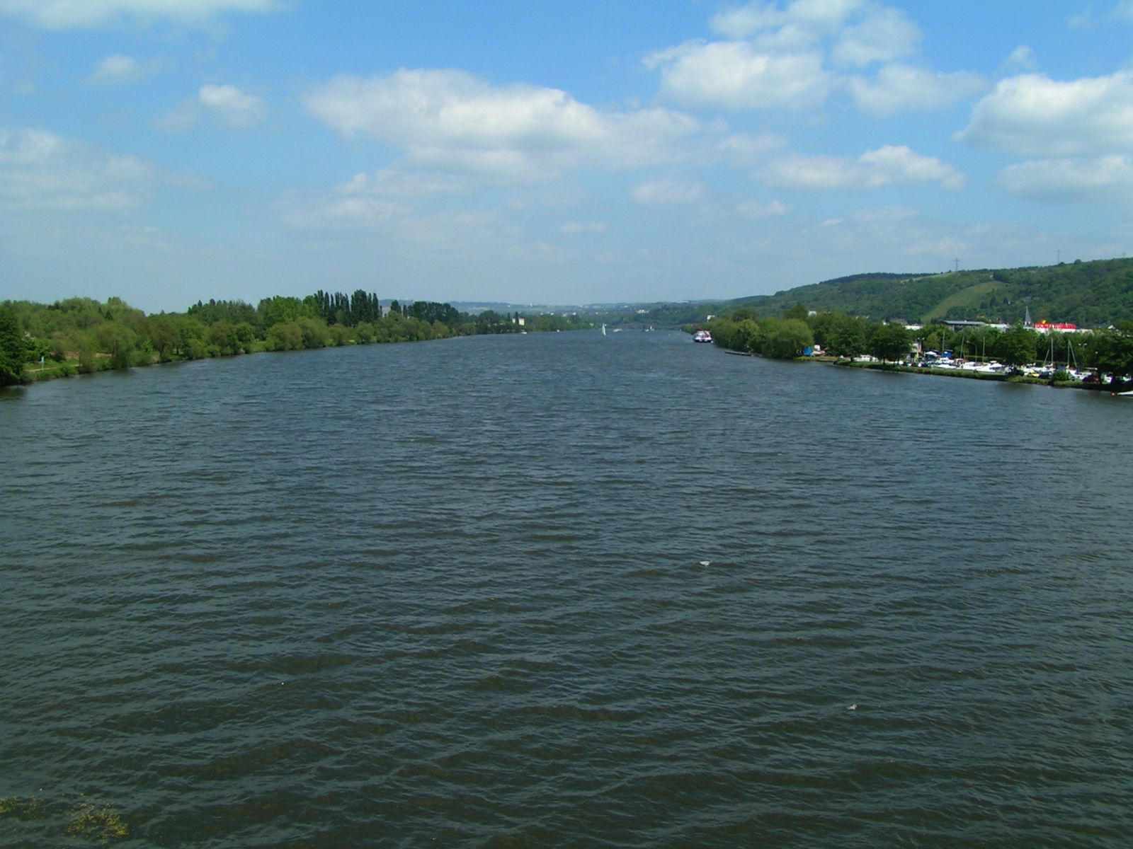 Mosel bei Konz GNU-FDL selbstfotografiert